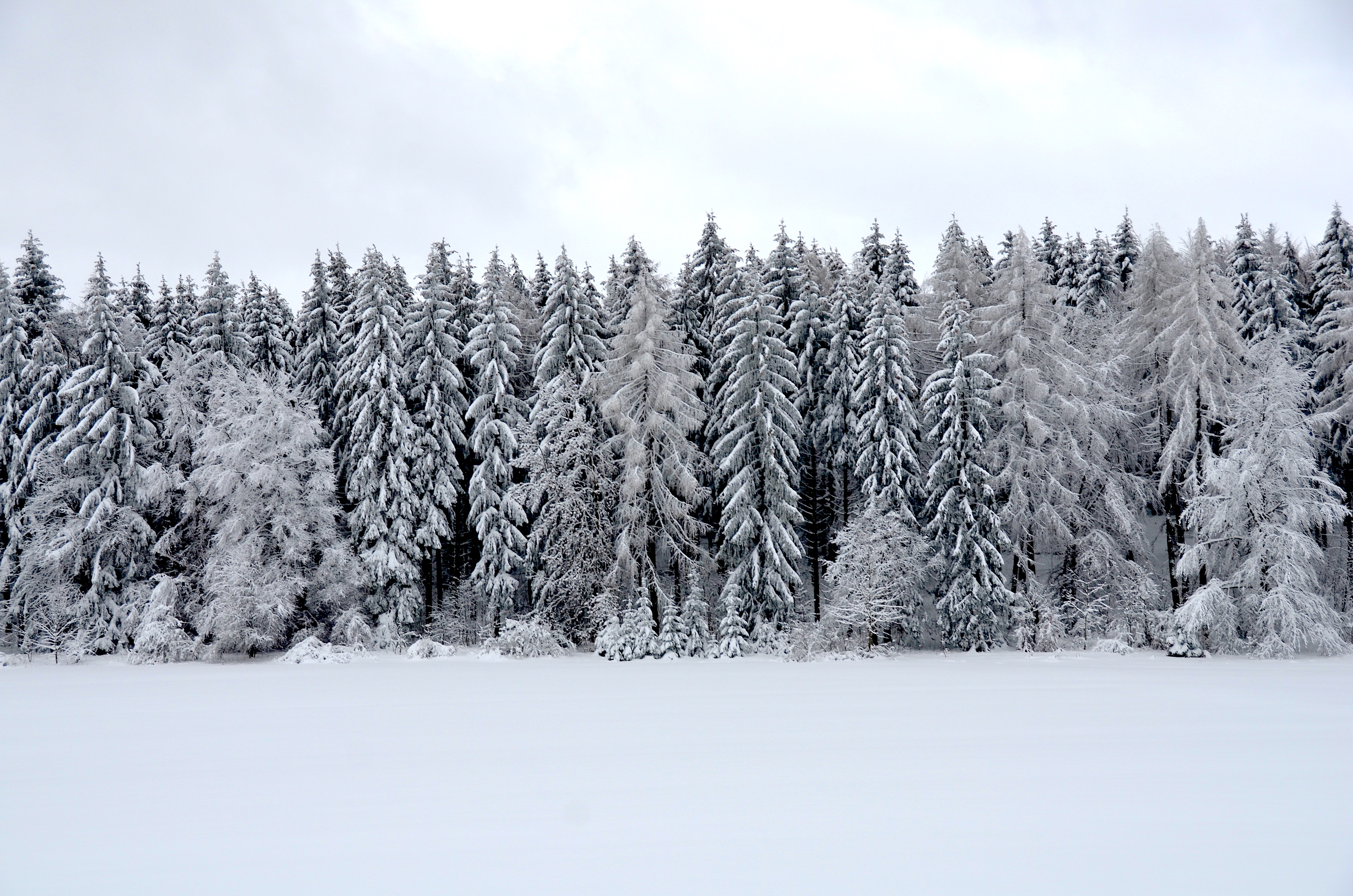 Neuschnee auf der Schwäbischen Alb (2019)